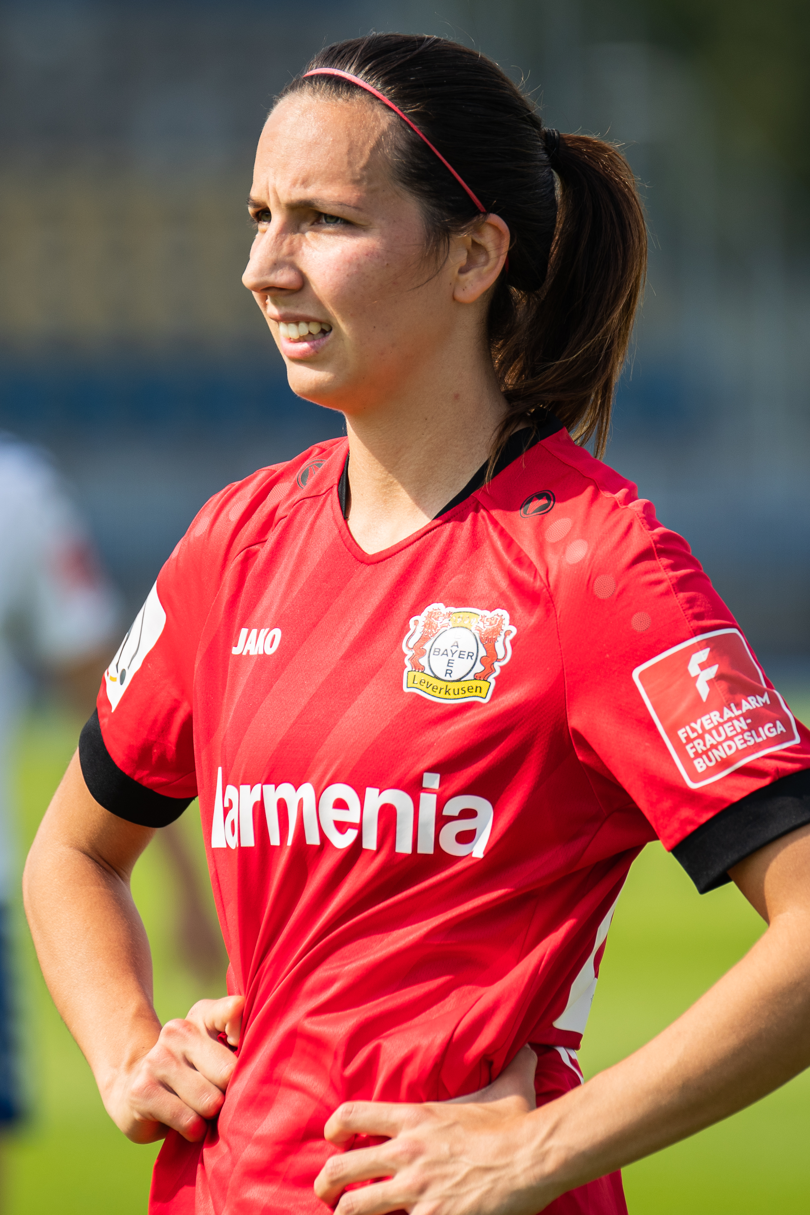 Fußball, Flyeralarm Frauen-Bundesliga, FF USV Jena - Bayer 04 Leverkusen; Ivana Rudelic (Bayer 04 Leverkusen, 25); Porträt, Einzelbild